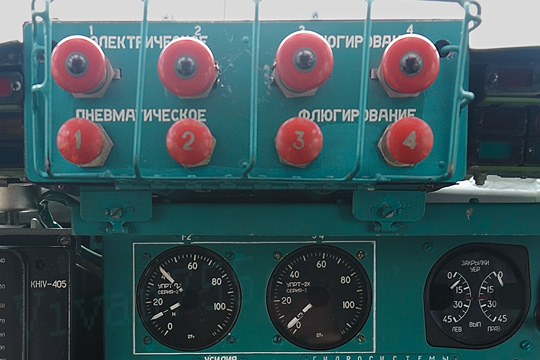 Кнопки флюгирования, указатели положения рычагов топлива и указатель положения закрылков самолётов Ту-95/Ту-142